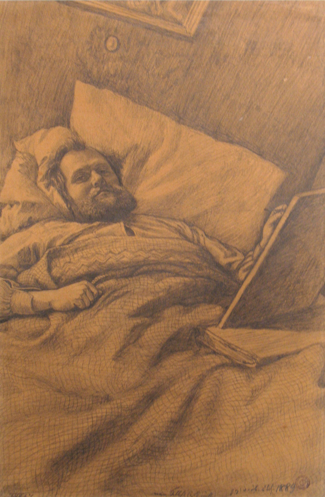 Crayon sur papier vélin. Achat en 1917